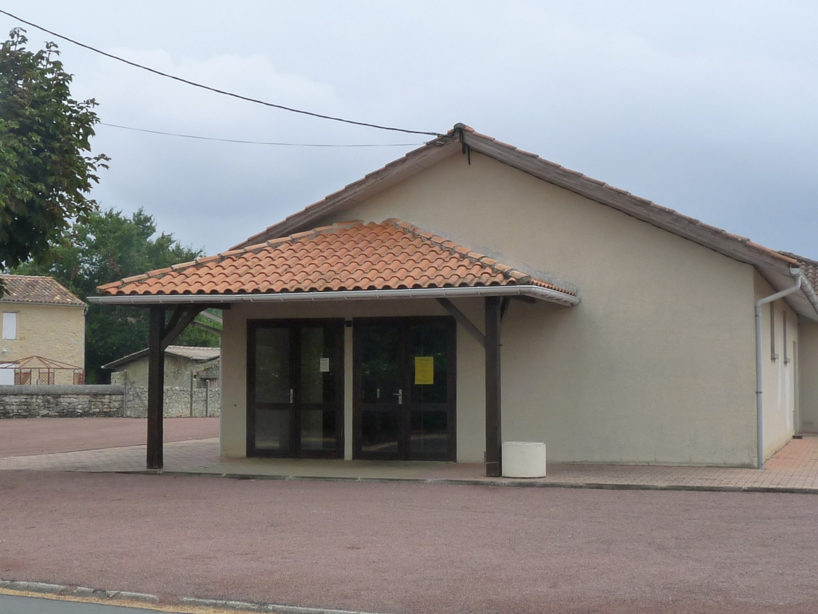 Foyer rural, Campugnan,Gironde, France